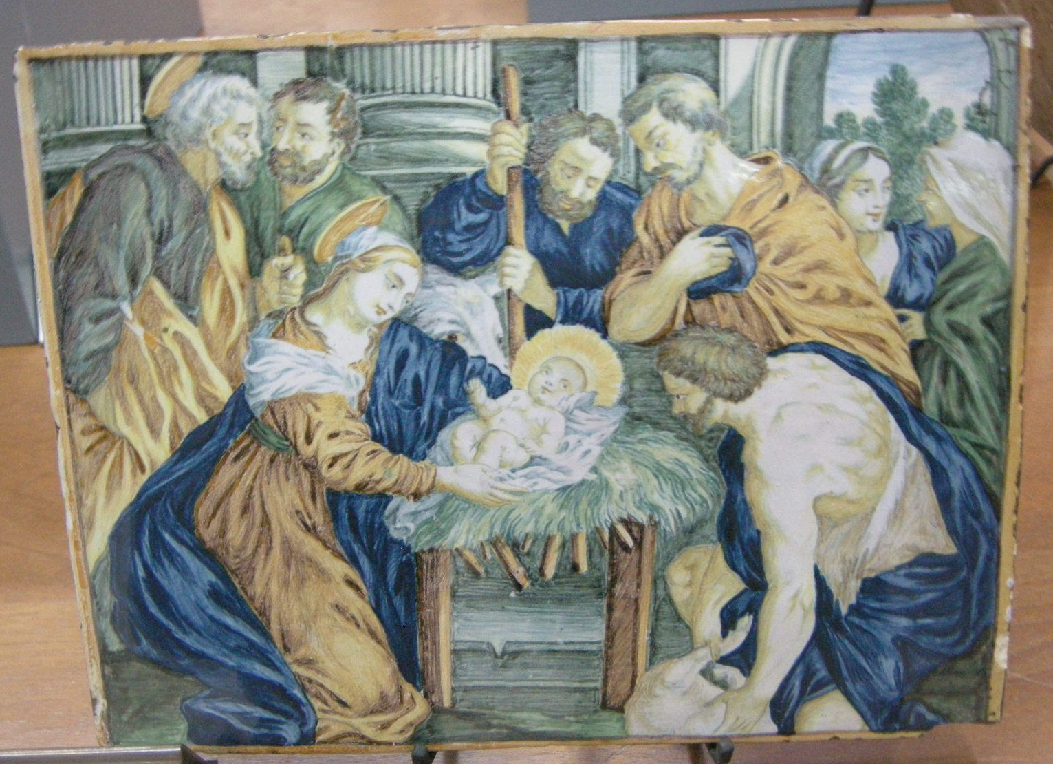 C.sf., castelli, bernardino gentili il giovane, mattonella con adorazione dei pastori, 1760-1775